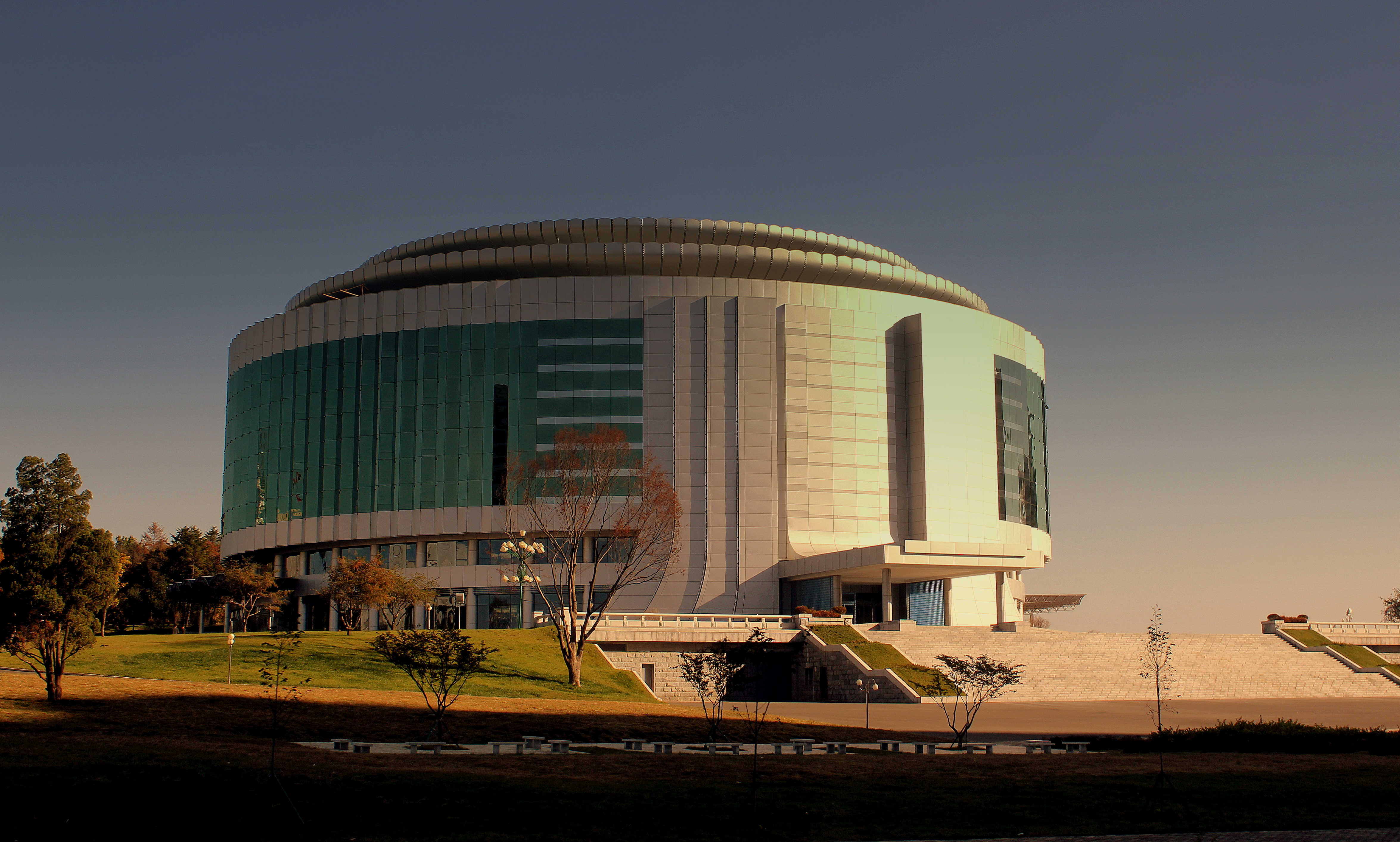 PYONGYANG CITY DPRK NORTH KOREA OCT 2012